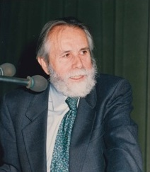 Michele de Benedictis